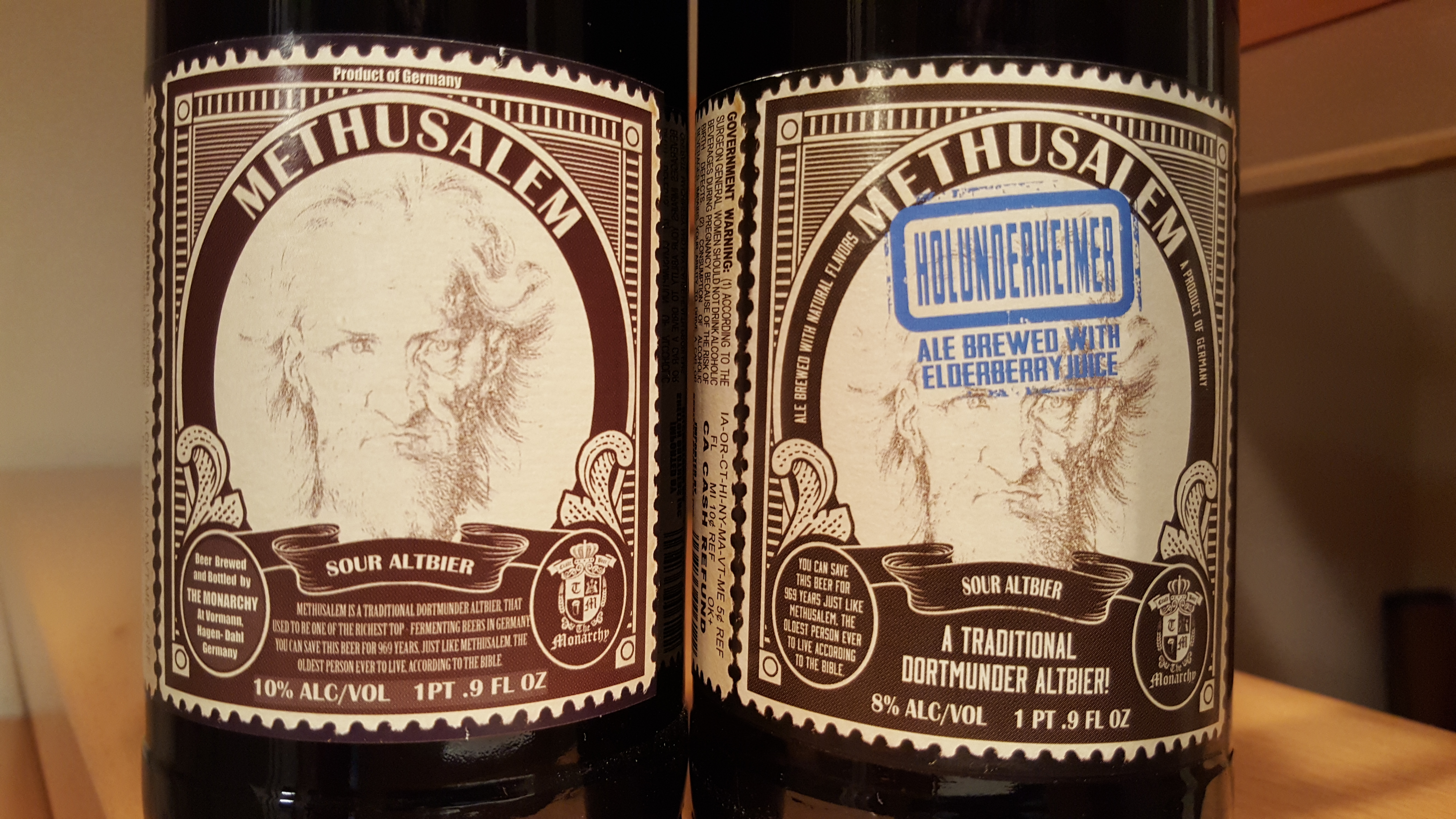 Methusalem-Etiketten